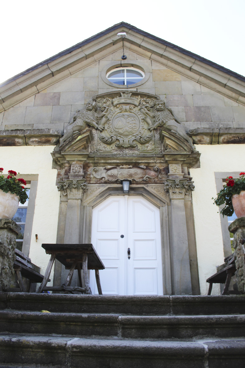 Eingang, Eingangsportal, Gut Almerfeld, Wappen